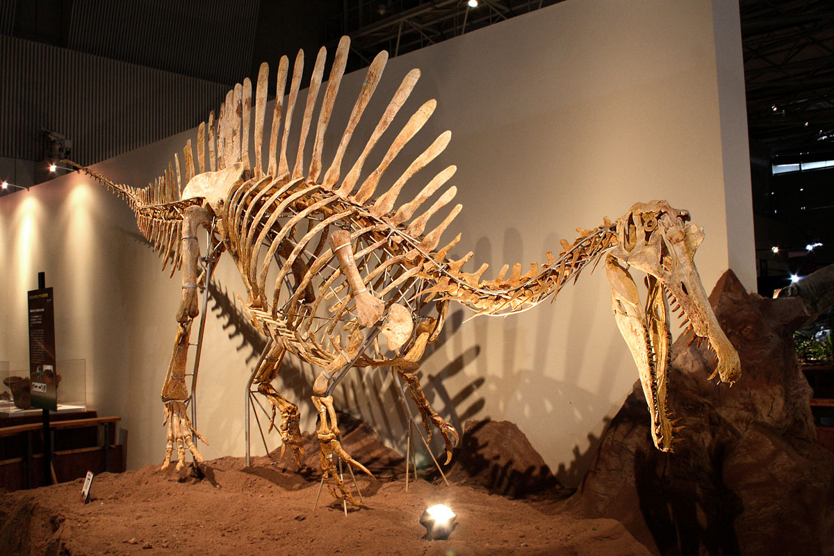 Spinosaurus (Subadult) - 05